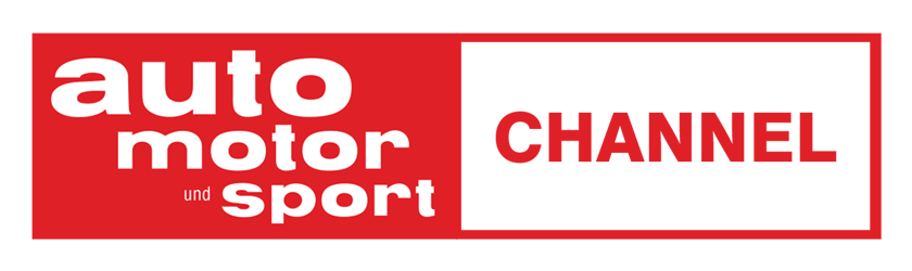 Logo Fernsehsender Auto motor sport channel